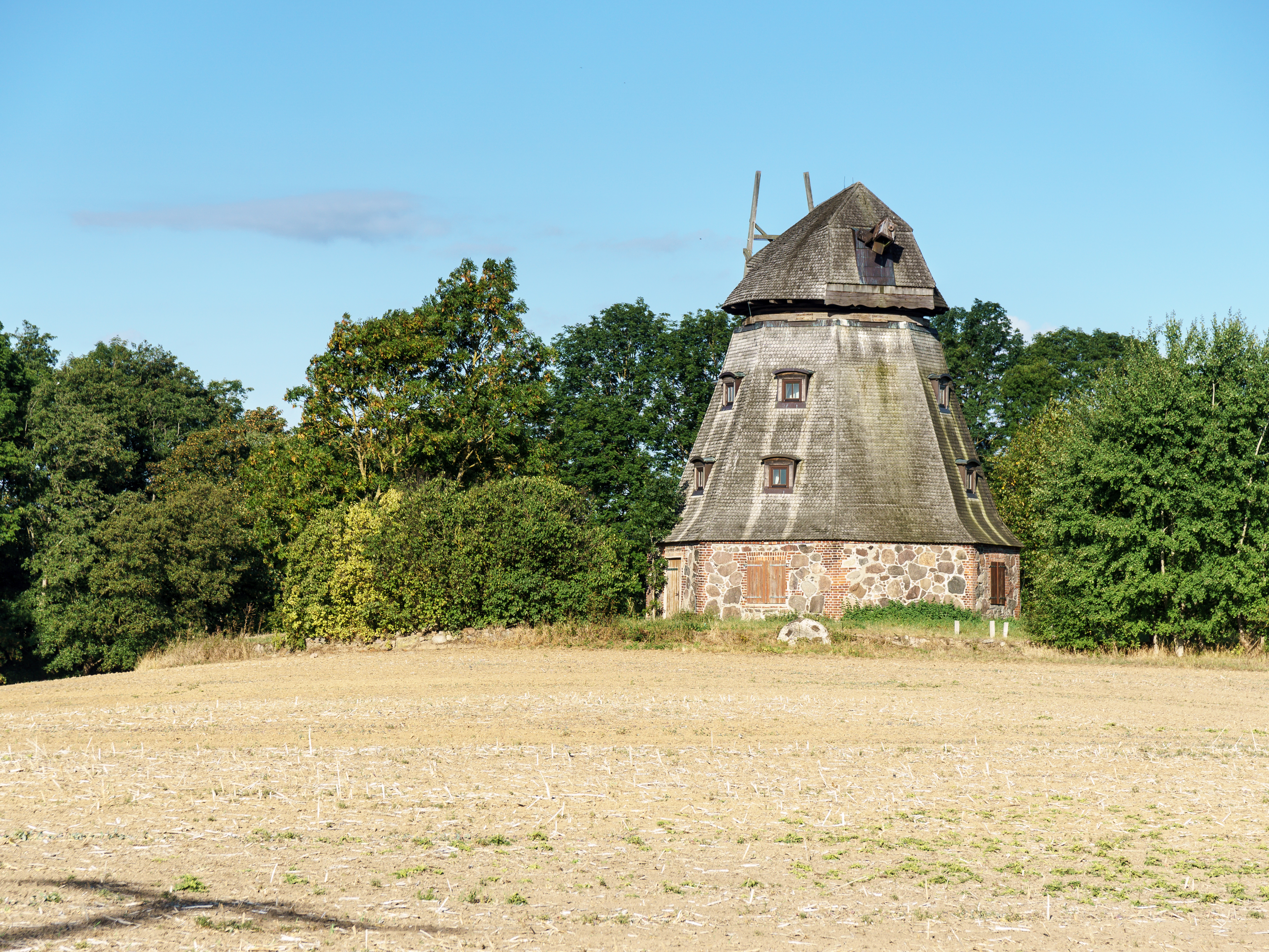 Schamper Mühle, Erdholländermühle, Röbeler Straße 4 in Gotthun ID 143